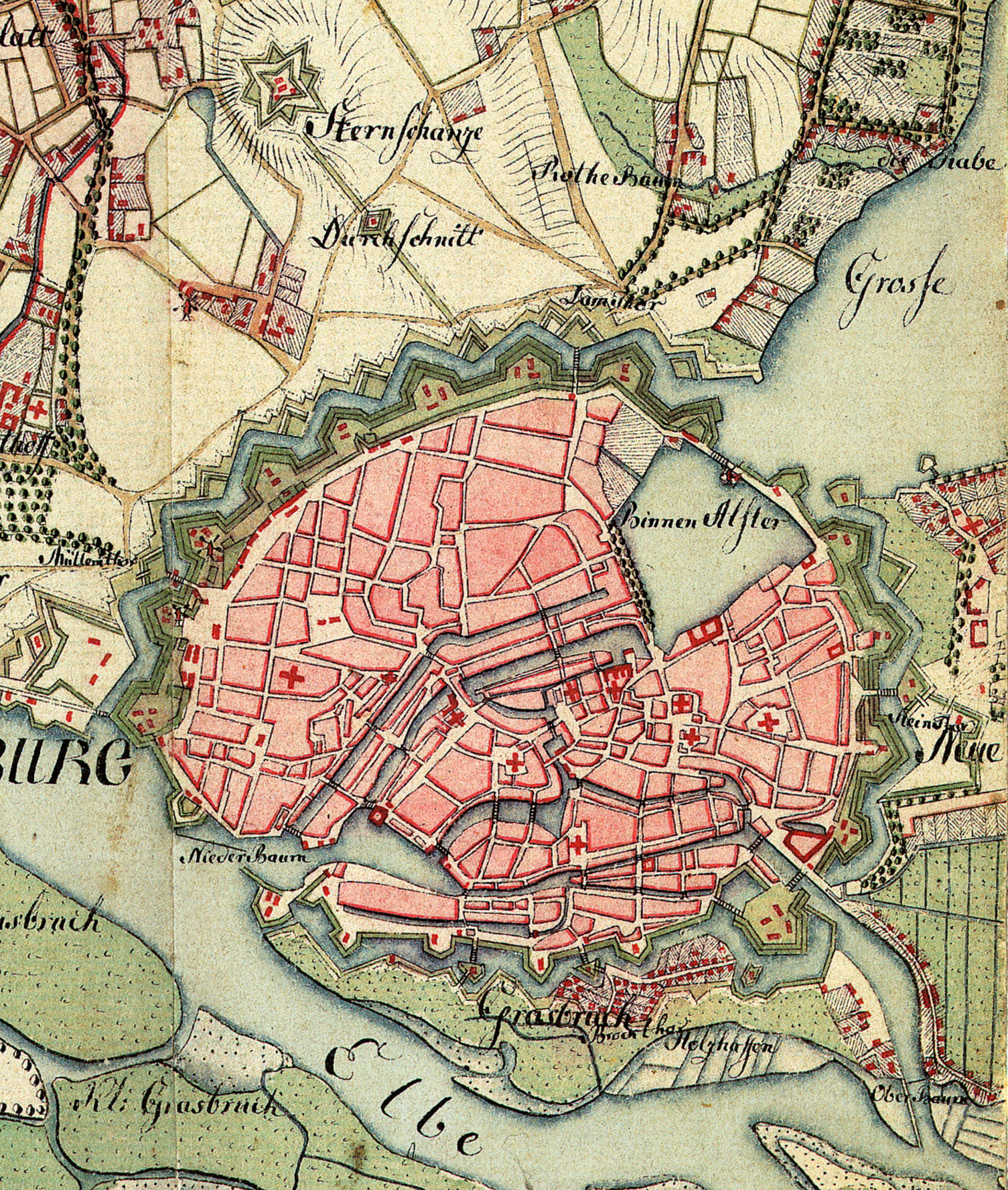 Ausschnitt Wallanlagen aus aus File:Varendorf(62)Altona_Hamburg_Harburg.jpg. Aufgenommen in den Jahren 1789 bis 1796 unter der Direktion des Majors Gustav Adolf von Varendorf durch Offiziere des Schleswigschen Infanterieregiments